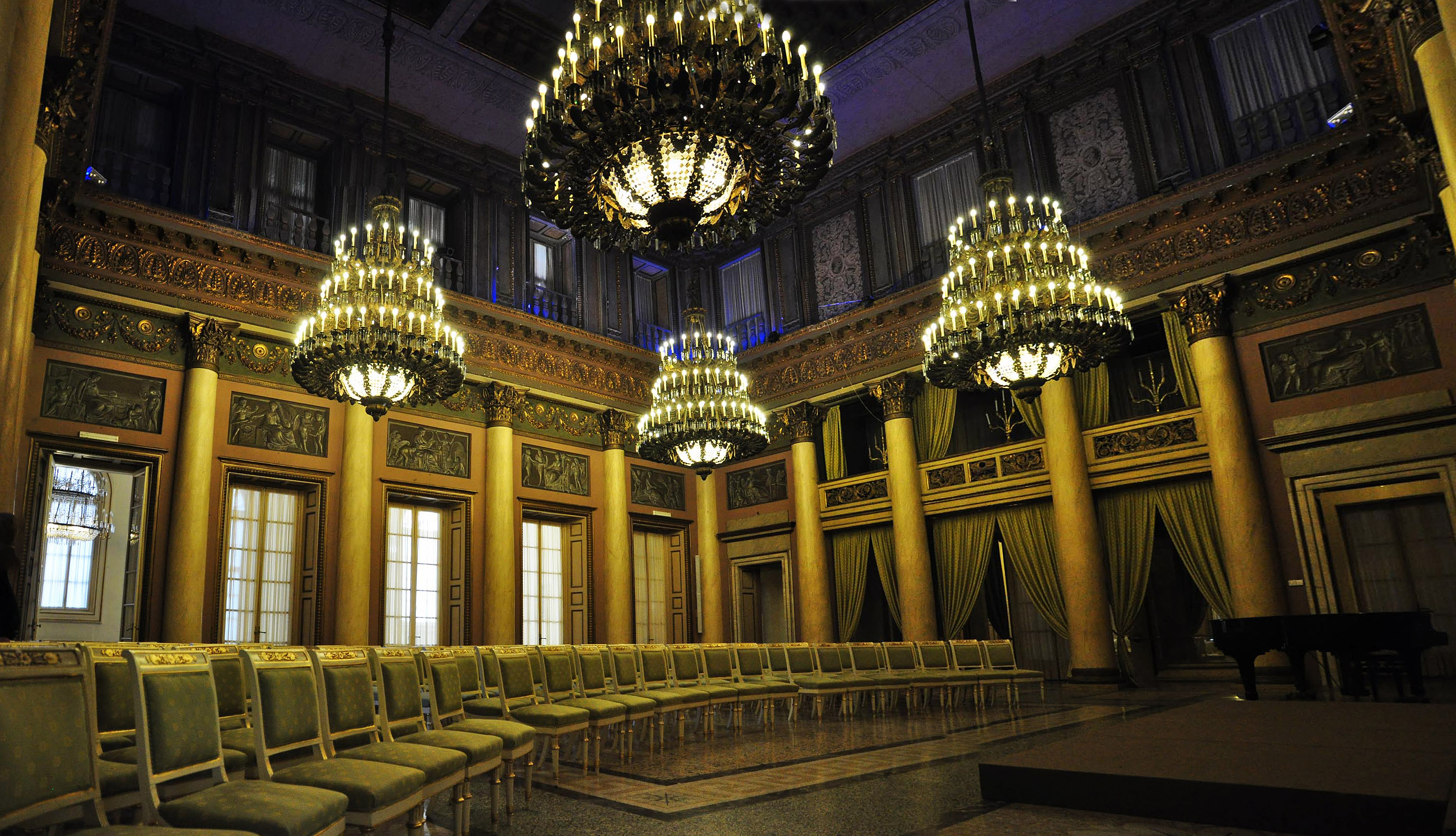 Sala d'oro del Palazzo Spinola a Milano, la sala da ballo più grande della città.